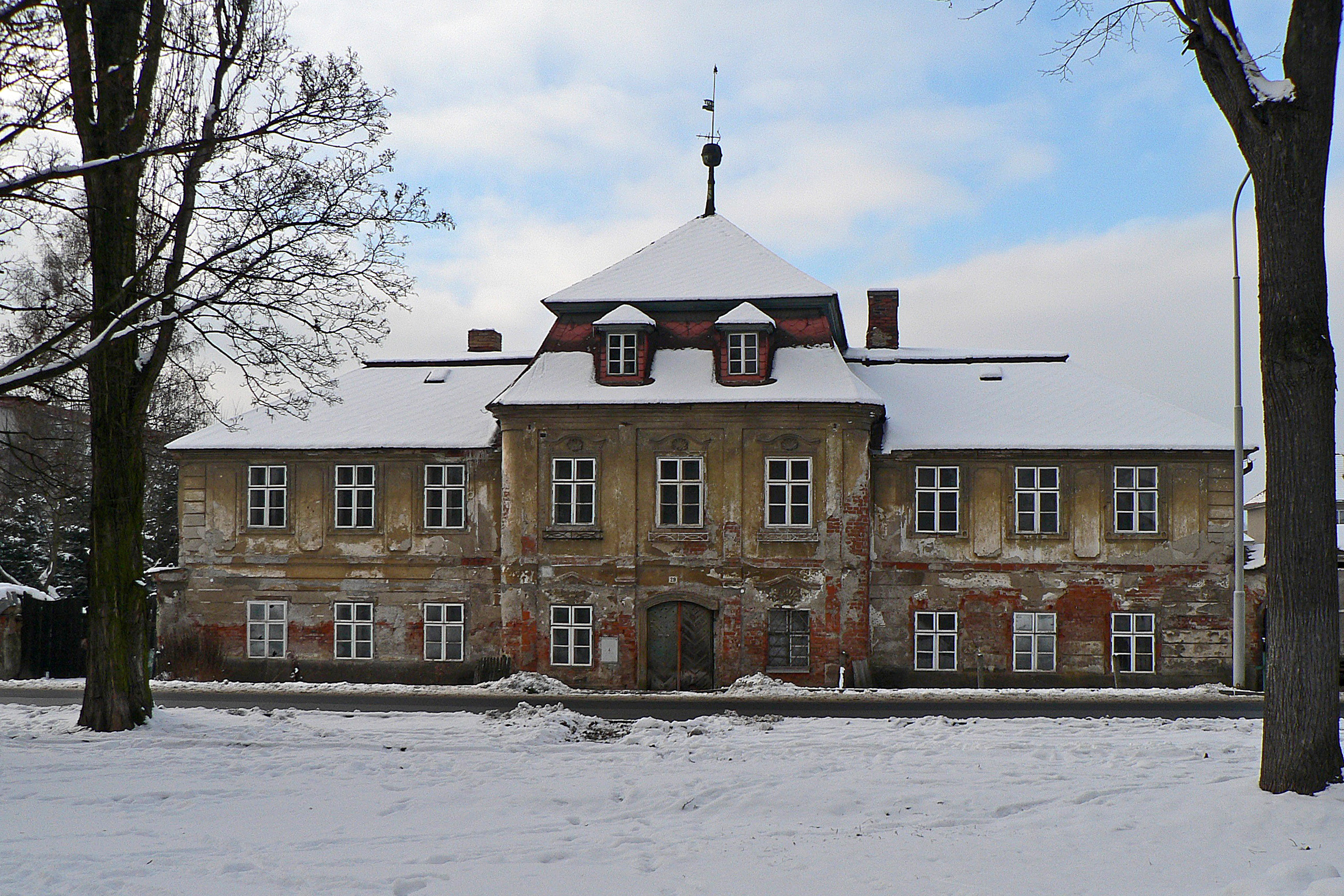 Barokní dům čp. 70 v Šumperku